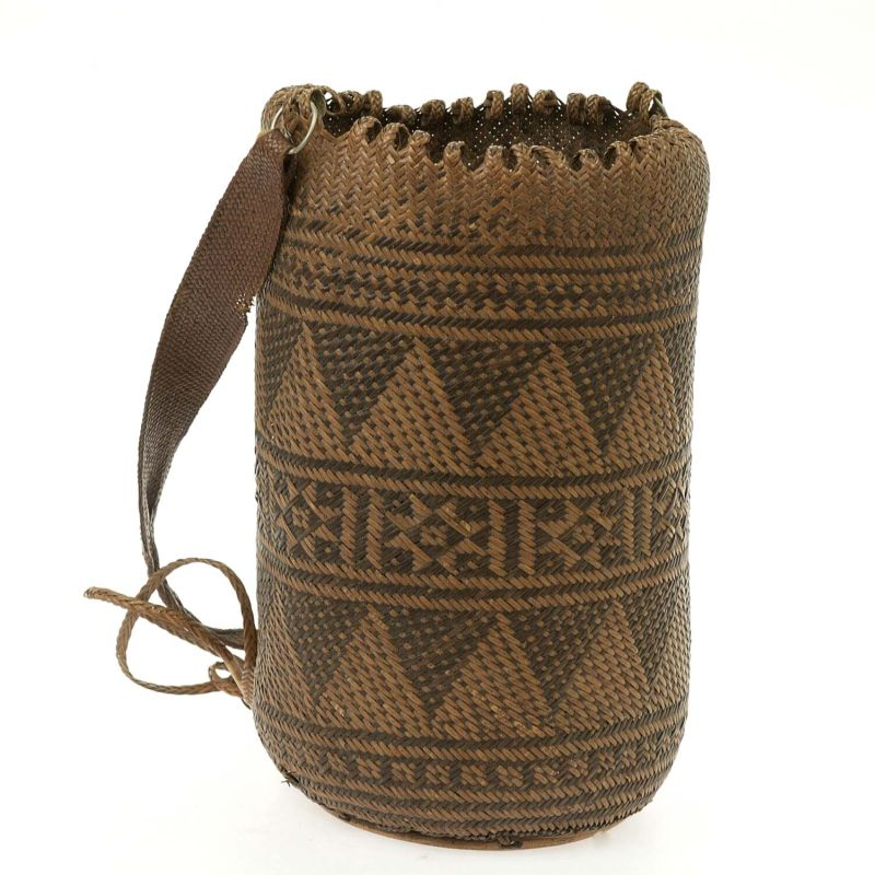 Draagmand. Gevlochten draagmand